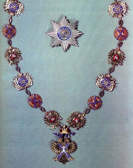 Знак на орденской цепи и звезда ордена Святого апостола Андрея Первозванного. Из собрания Государственного Исторического музея